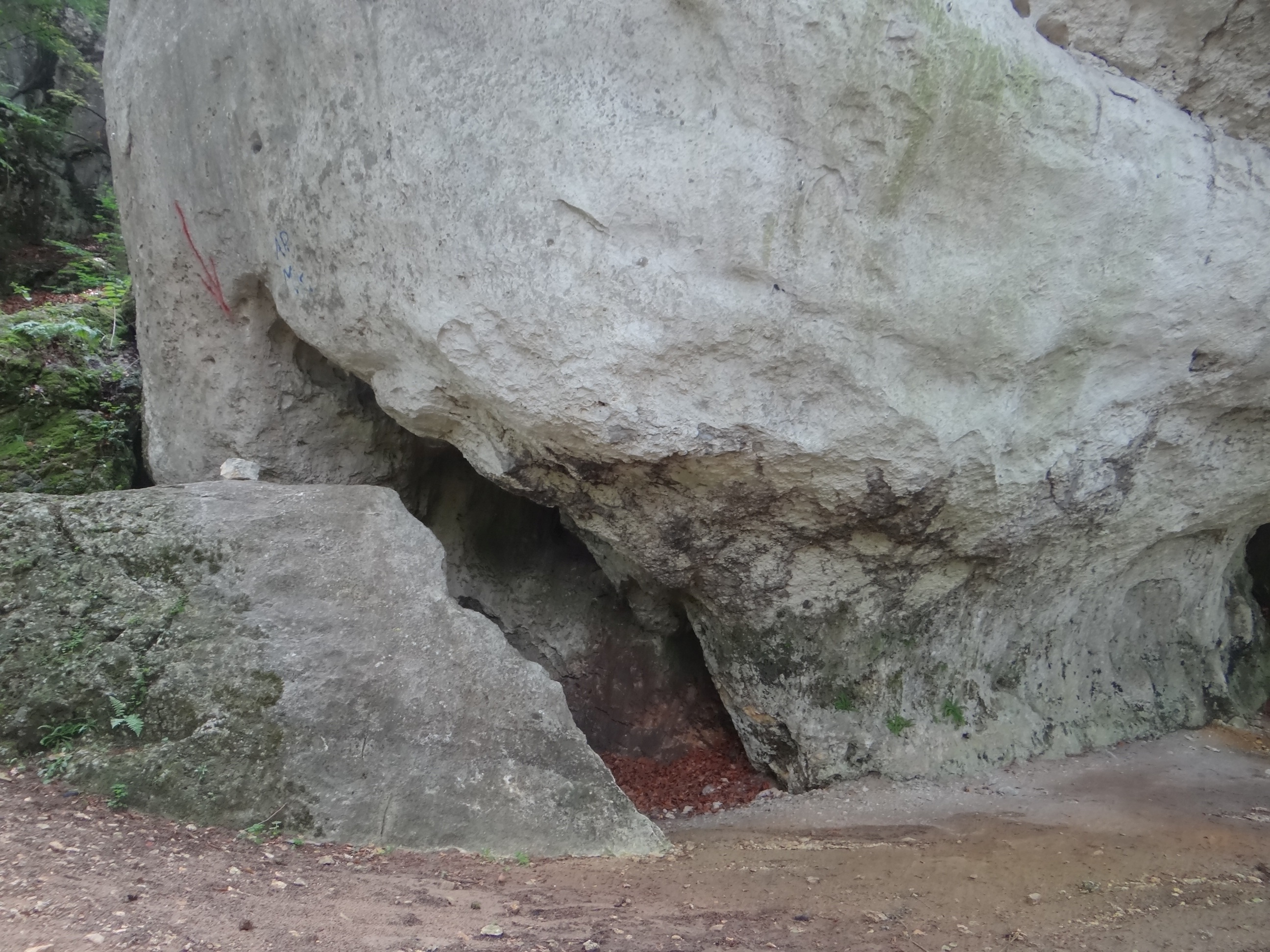 Jaskinia w Kruczej Skale. Lokalizacja: Polska, Wyżyna Częstochowska, Skały Kroczyckie, wzgórze Łysak, skała Wysokie Okapy